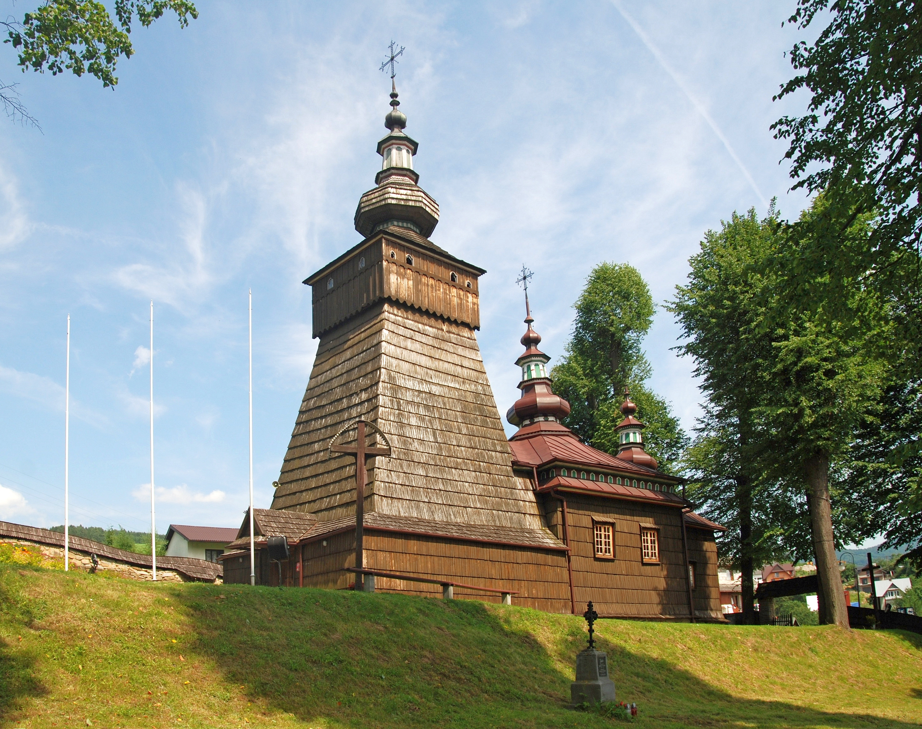 wieś Andrzejówka